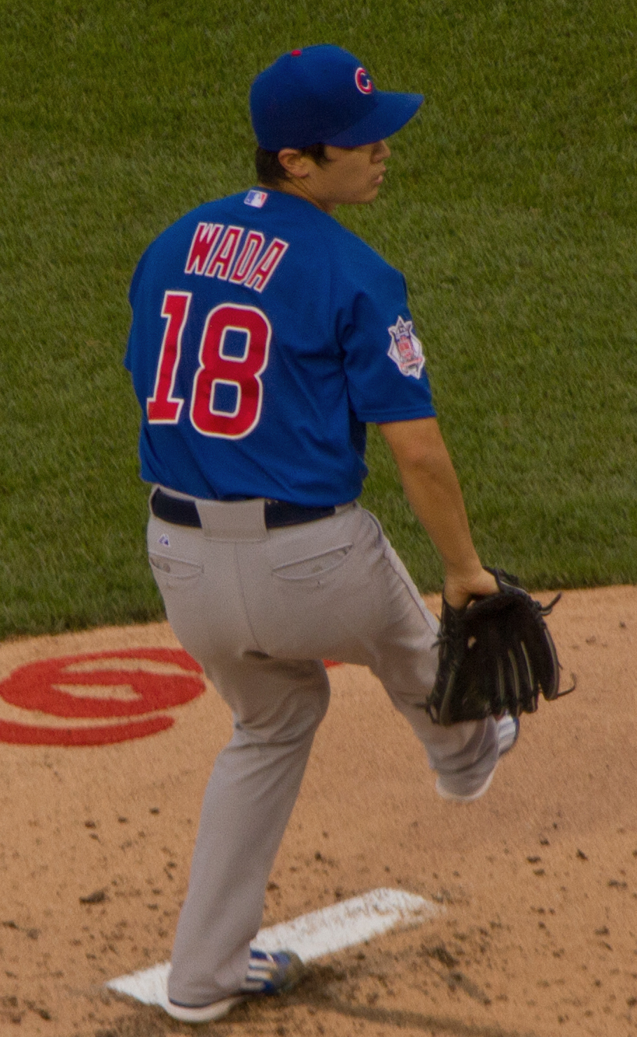 Tsuyoshi Wada